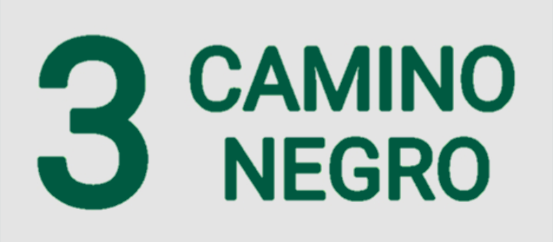 Línea 188 Ramal 3